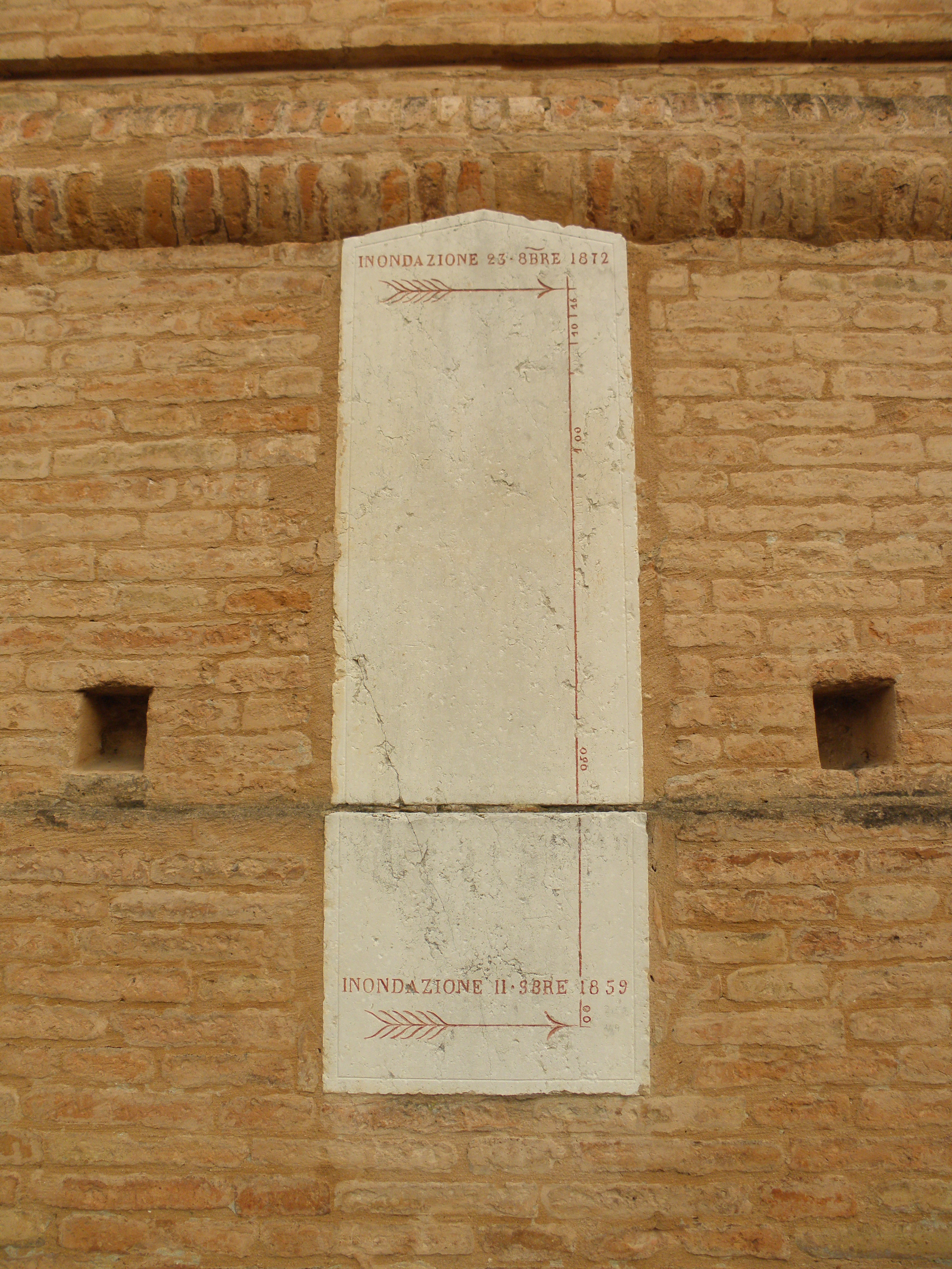 Sermide, già comune autonomo e ora frazione e sede minicipale del comune sparso di Sermide e Felonica: la chiesa parrocchiale dei Santi Pietro e Paolo Apostoli.